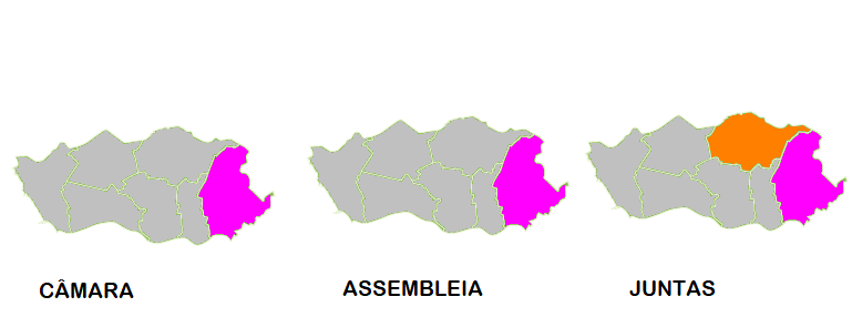 Mapa ilustrativo da lista mais votado por freguesia no Porto